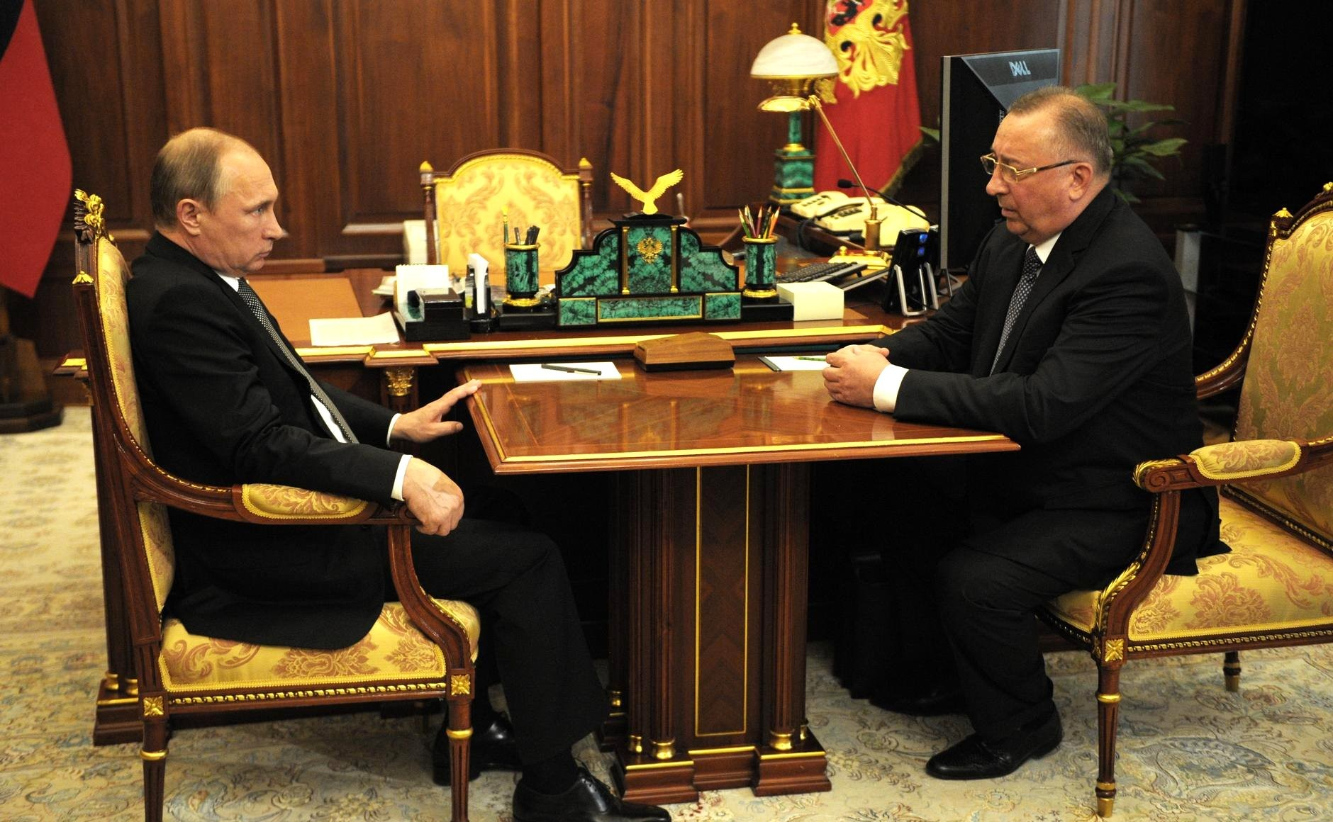 Встреча Владимира Путина с главой компании «Транснефть» Николаем Токаревым